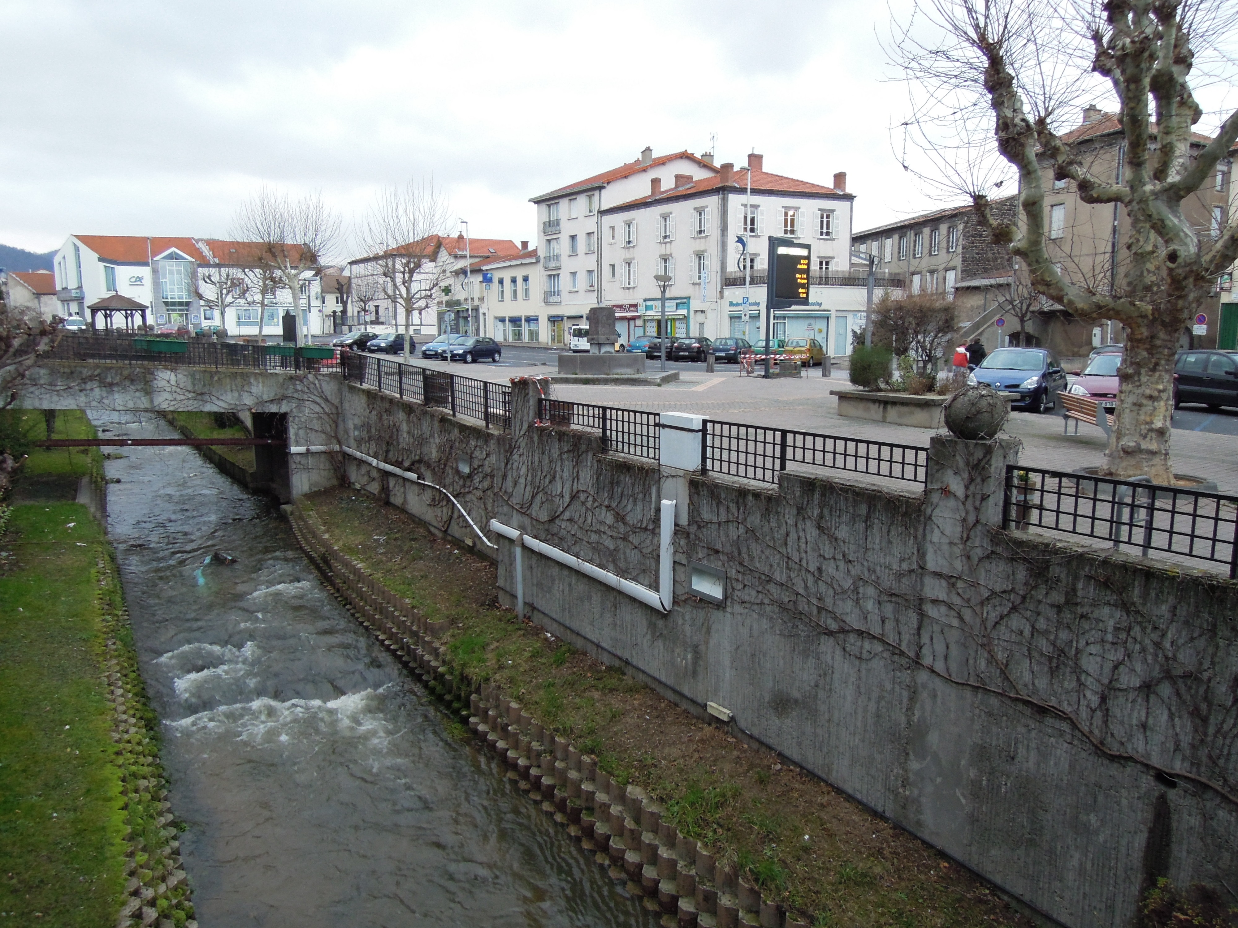 Vue sur la place des Ramaclès, Aubière, Puy-de-Dôme.